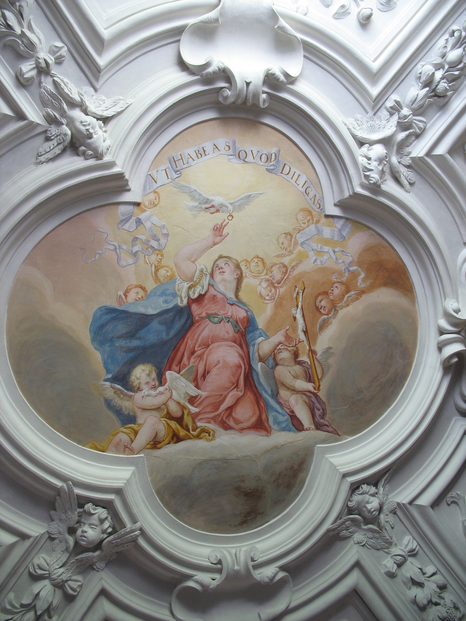 Kloster Benediktbeuern, Fresko in der Klosterkirche